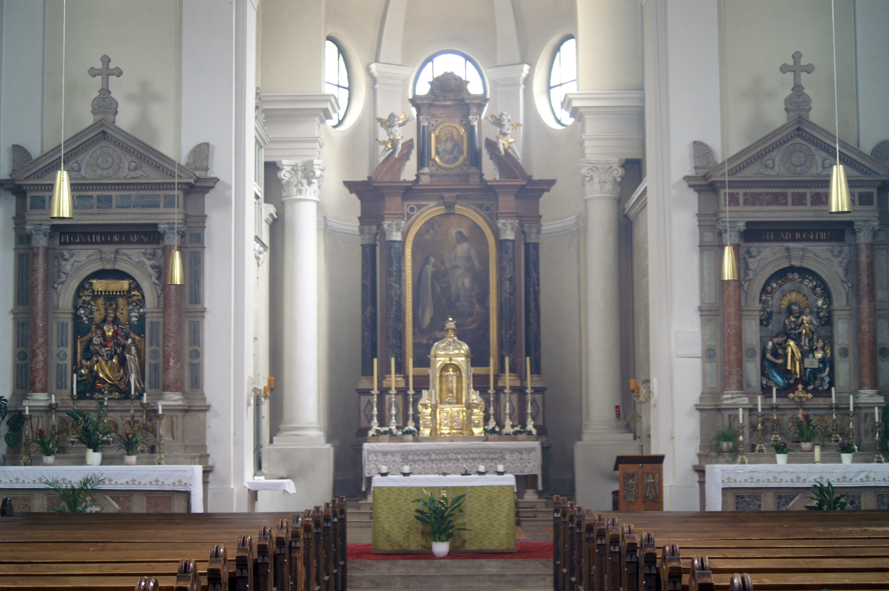 Innenraum der ehemaligen Klosterkirche